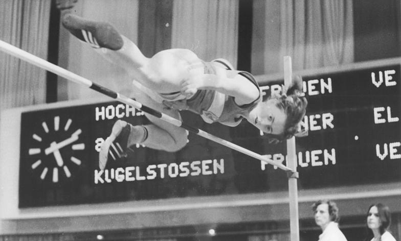 Rosemarie Witschas ADN-ZB Mittelstädt 28.1.73-Mi-Berlin: Leichtathletik-Hallensportfest in der Dynamo-Halle. Rosemarie Witschas mit Hallen-Weltbestleistung. Mit 1.91 m im Hochsprung erreichte Rosemarie Witschas (SC Cottbus) eine neue Hallen-Weltbestleistung. Die bisherige Bestleistung hielten Ilona Gusenbauer (Österreich) und Rita Kirst-Schmidt (DDR mit 1.90 m. Information added by Wikimedia users.